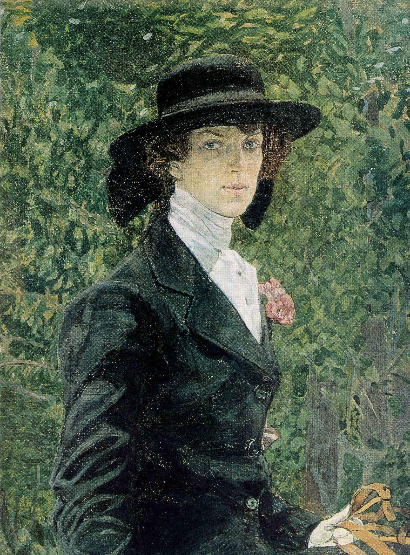 Портрет Ефимии Павловны Носовой. 1916. ГИМ НОСОВА Евфимия Павловна (1881-1960), ур. Рябушинская